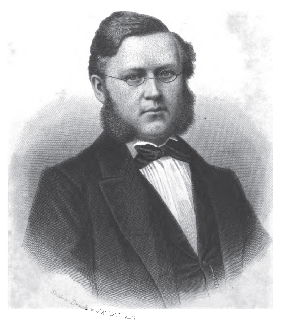 Den svenske poeten Ernst Björck (1838–1868).